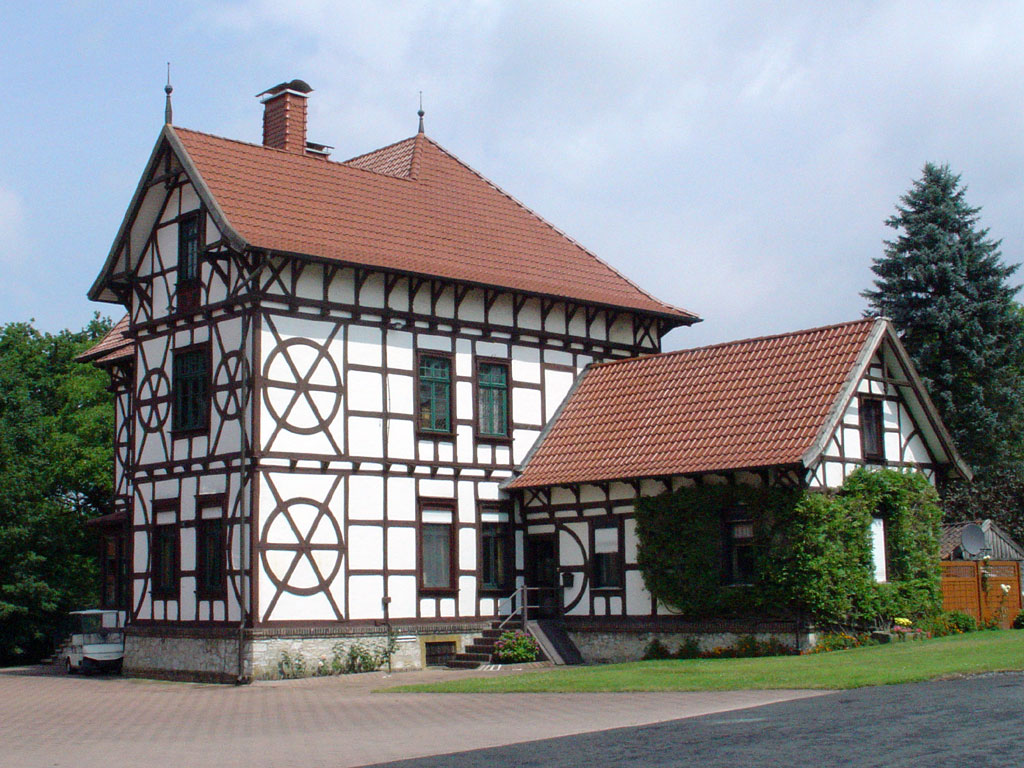 Ehem. Hauptgebäude des Guts Welschof, erbaut um 1600.